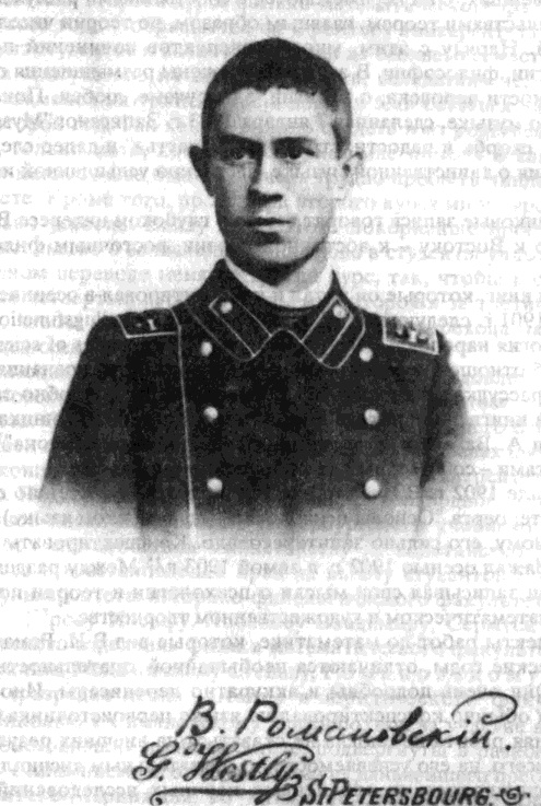 Российский и советский математик Всеволод Иванович Романовский. Один из основателей Ташкентского университета и высшего образования в Средней Азии. Фото во время обучения в Санкт-Петербургском университете